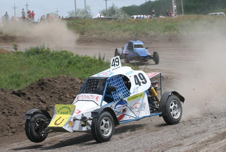 багги